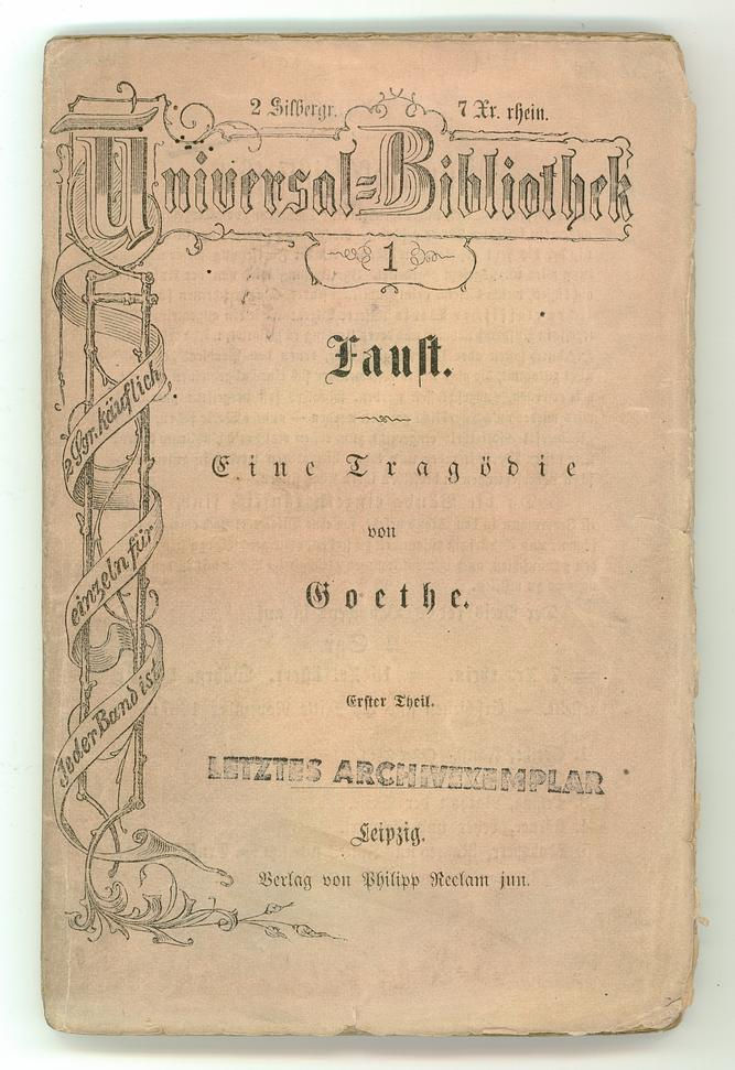 Faust I. Exemplar der Erstausgabe der Nr. 1 von "Reclams Universal-Bibliothek" aus dem Stadtgeschichtlichen Museum Leipzig.